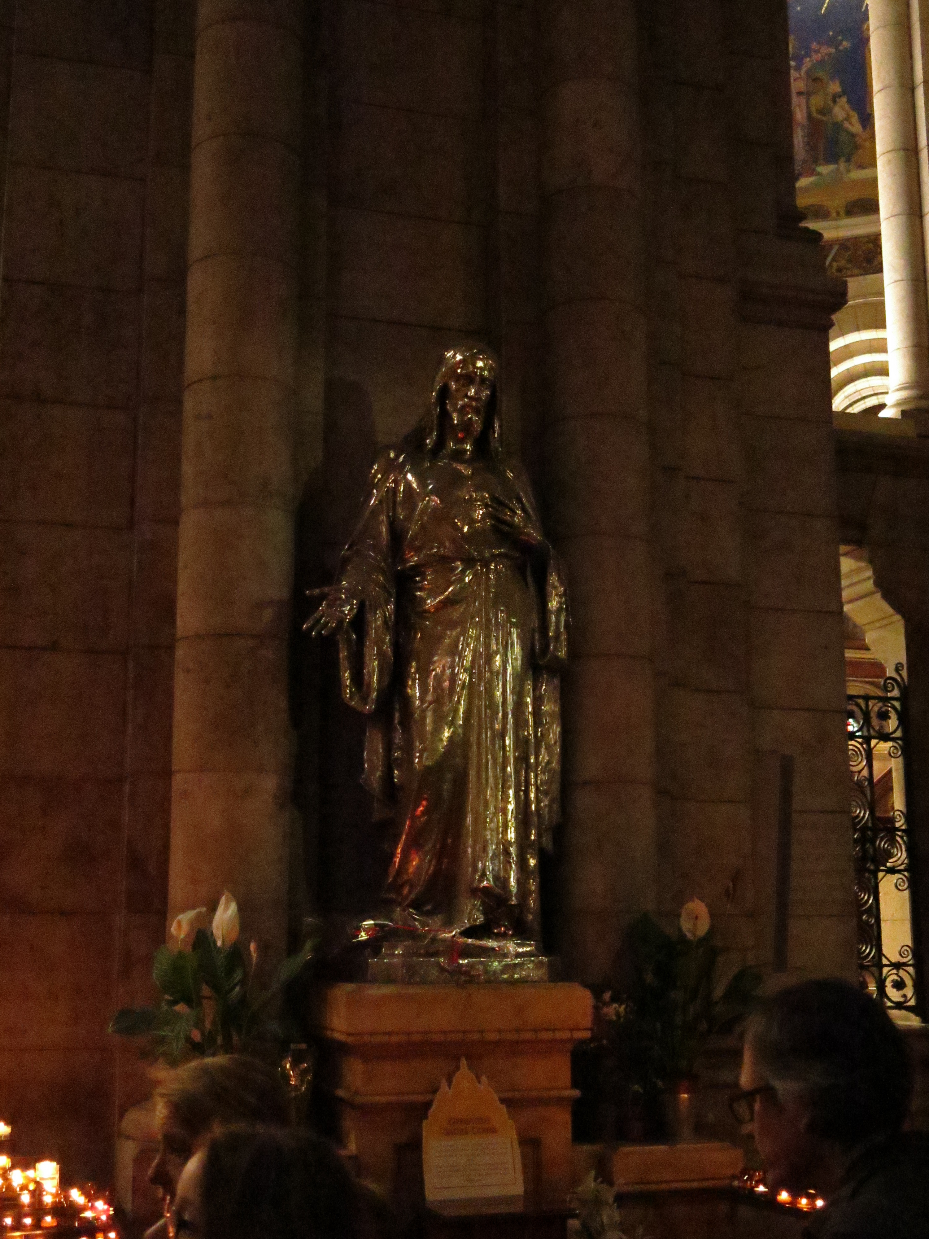 Statue dans basilique du Sacré-Cœur